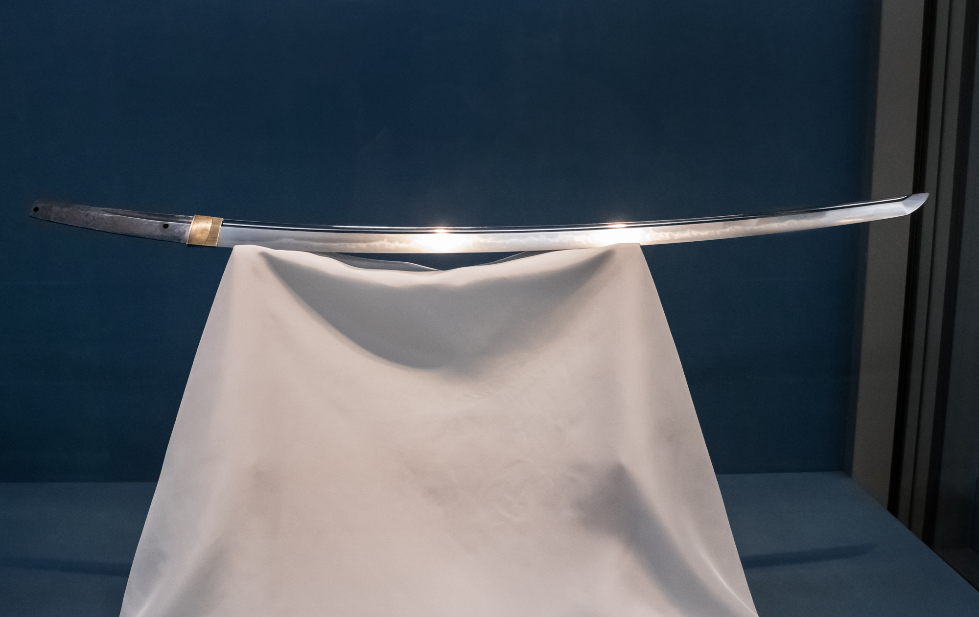 太刀 - 福岡一文字助真、 銘「助真」、別名「日光助真」（国宝）。日光東照宮蔵。鎌倉時代。